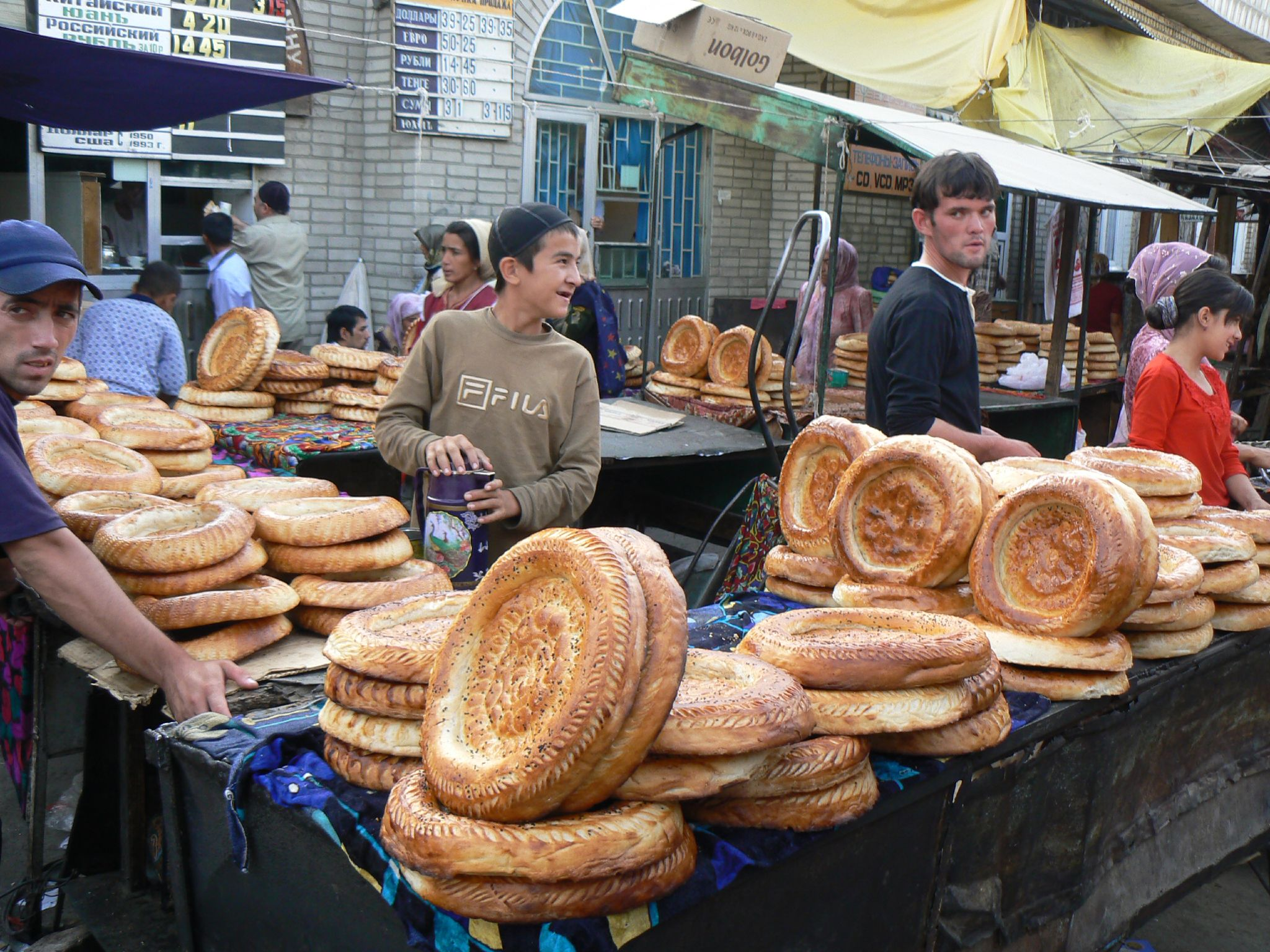 Market stand selling bread in Osh